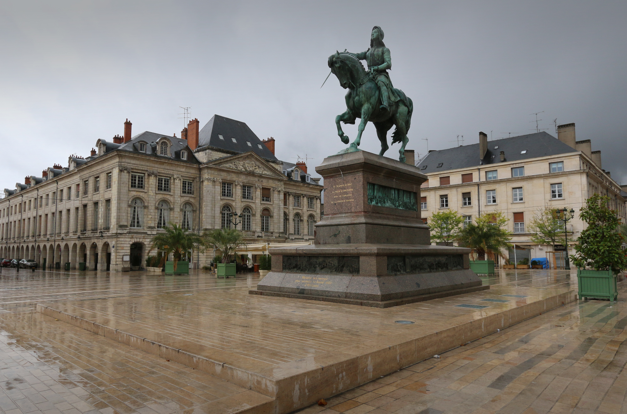 Statue équestre de Jeanne d'Arc, place du Martroi.